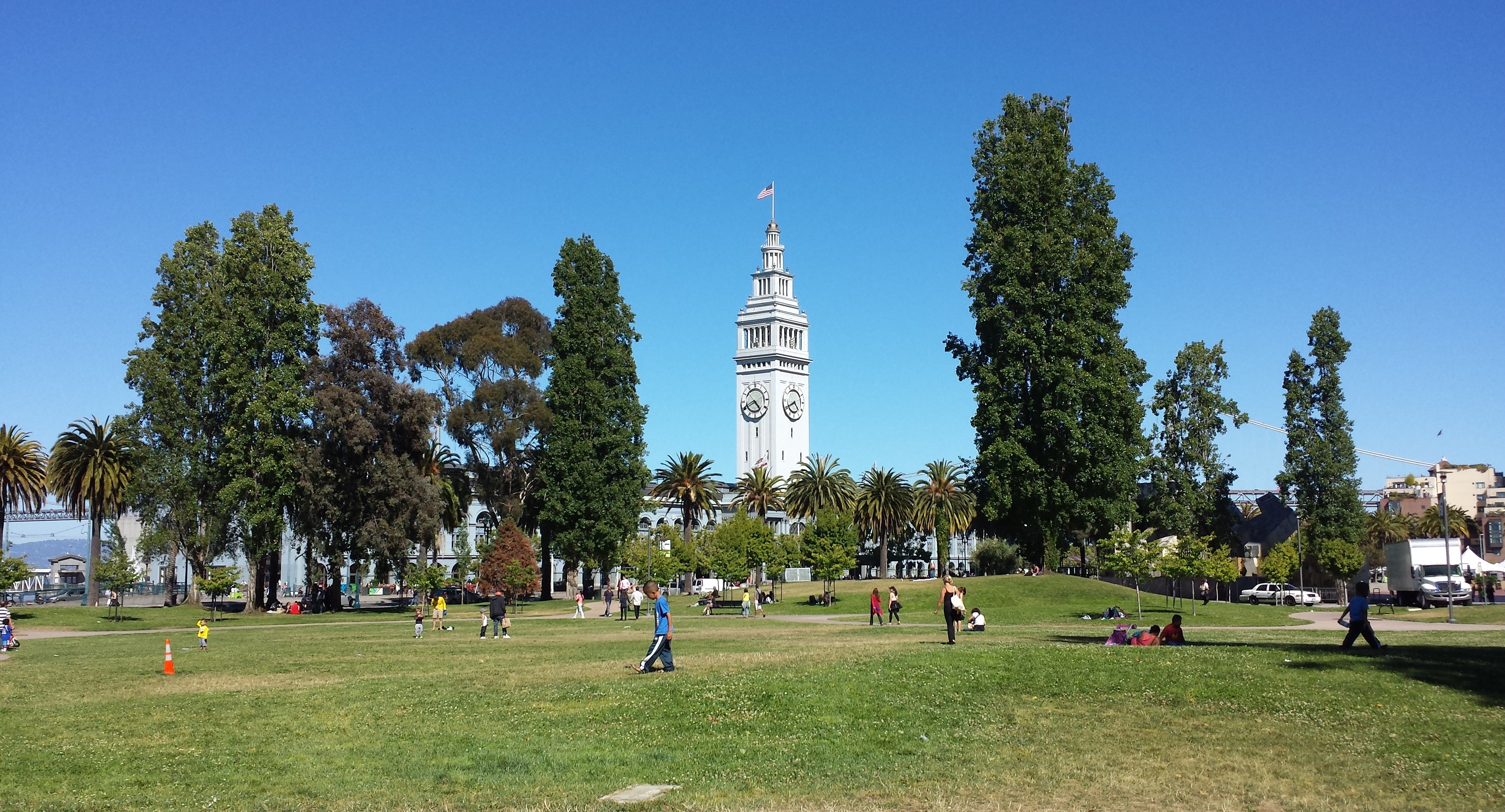 San Francisco Ferry Building mit Sue-Bierman-Park